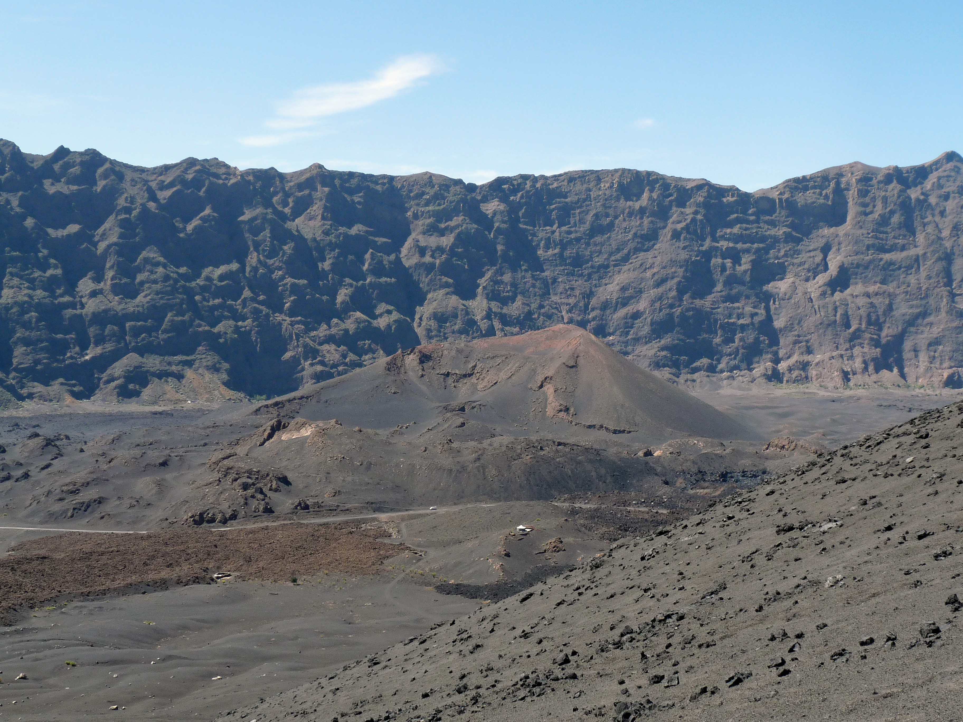 Chã das Caldeiras (île de Fogo, Cap-Vert) : route contournant un cône adventif du Pico do Fogo